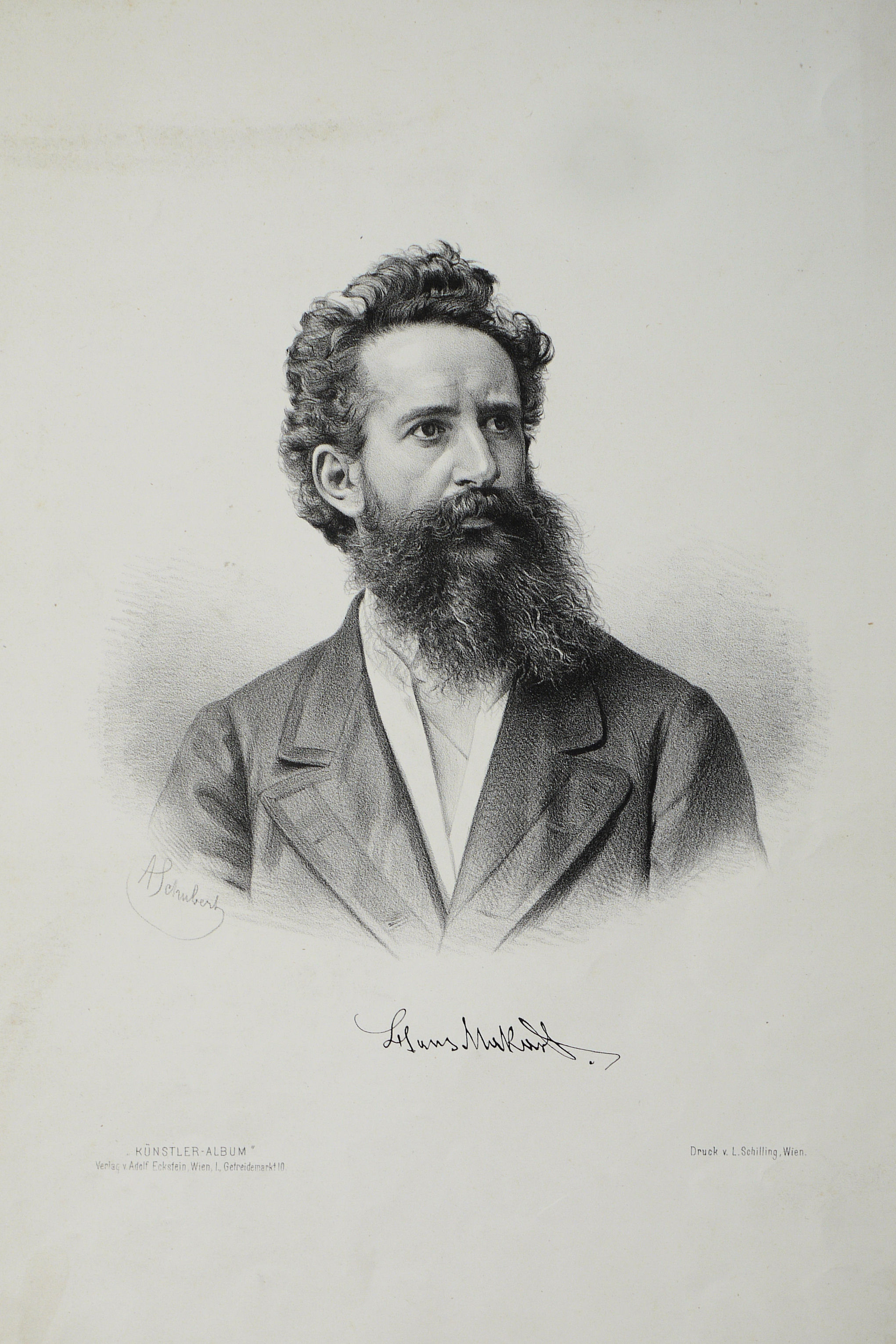 Hans Makart (1840-1880) österreichischer Maler. Lithographie von A. Schubert um 1875.Aus dem "Künstleralbum" des Verlags Adolf Eckstein